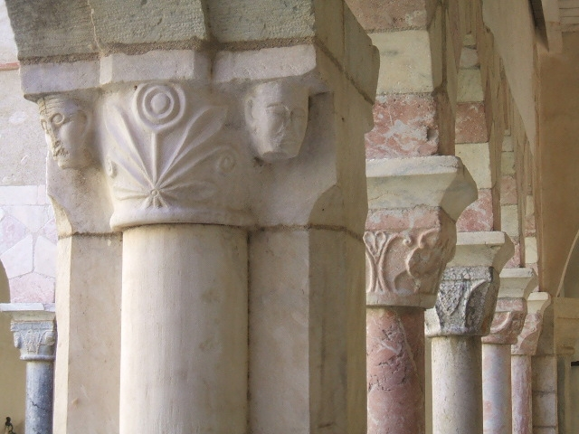 Abbaye de Saint-Génis-des-Fontaines (Pyrénées-Orientales, Languedoc-Roussillon, France) : cloître (XIIIème siècle) : enfilade de chapiteaux